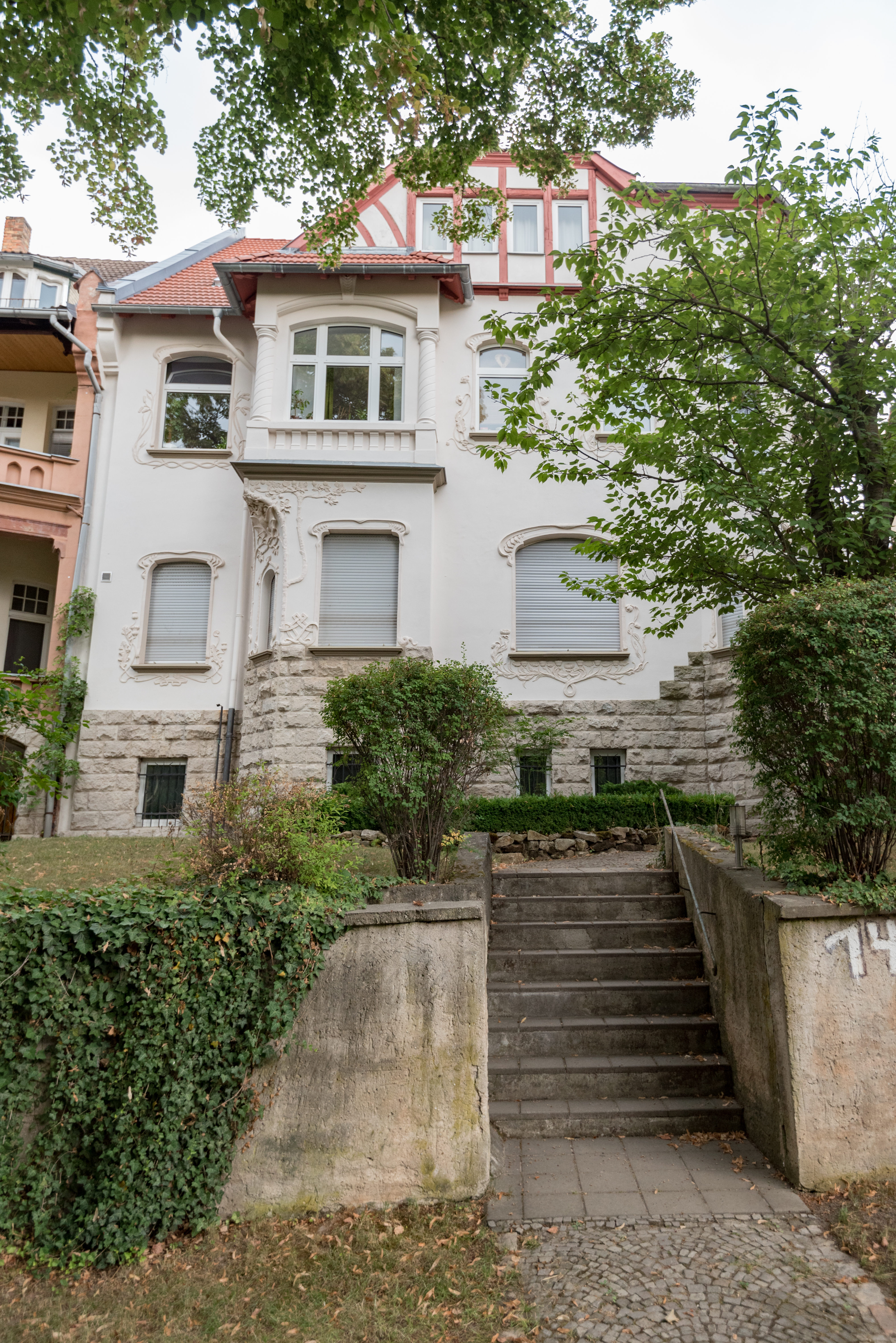 Naumburg (Saale), Luisenstraße 14